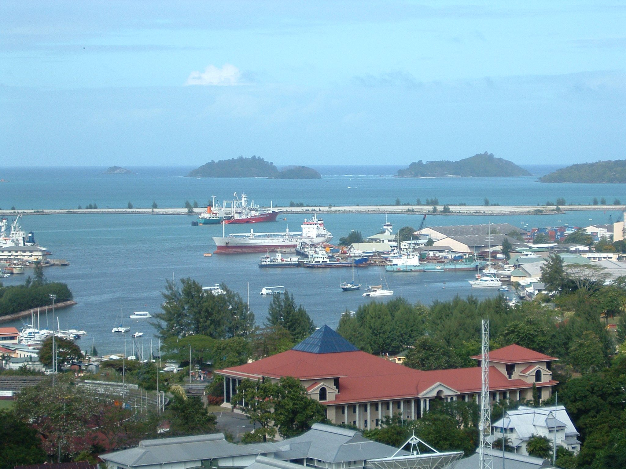 Port Victoria inner harbour. Vue du port de Port-Victoria (Mahé).